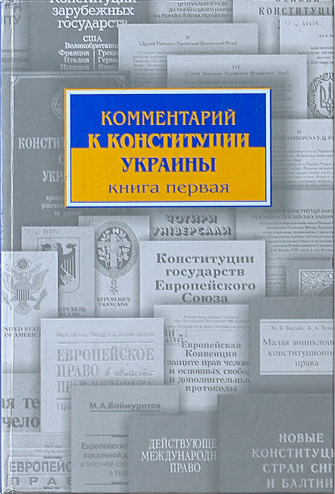 Коментарий